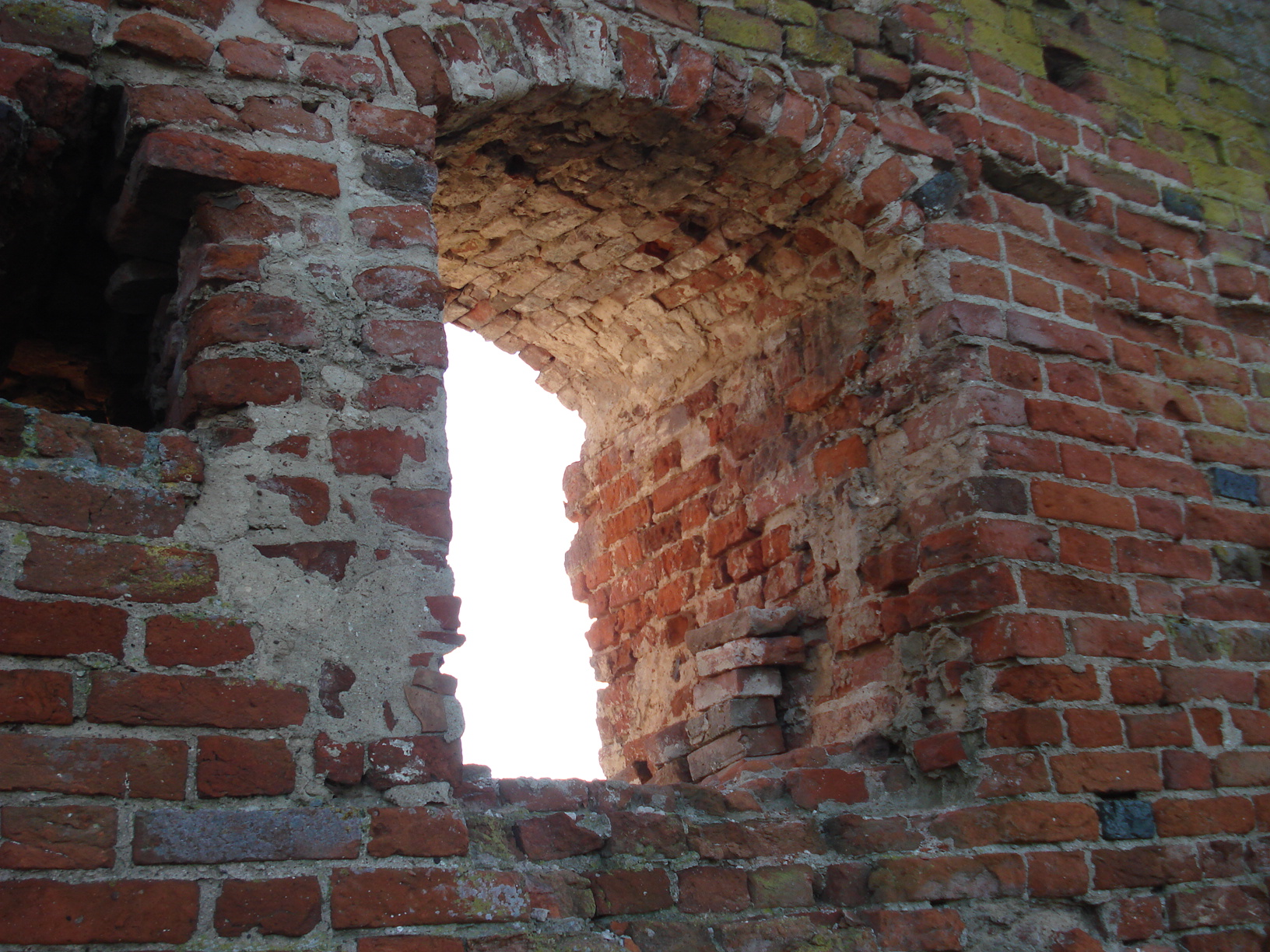 Zamek Kiszewski - mury obronne zamku, XIV